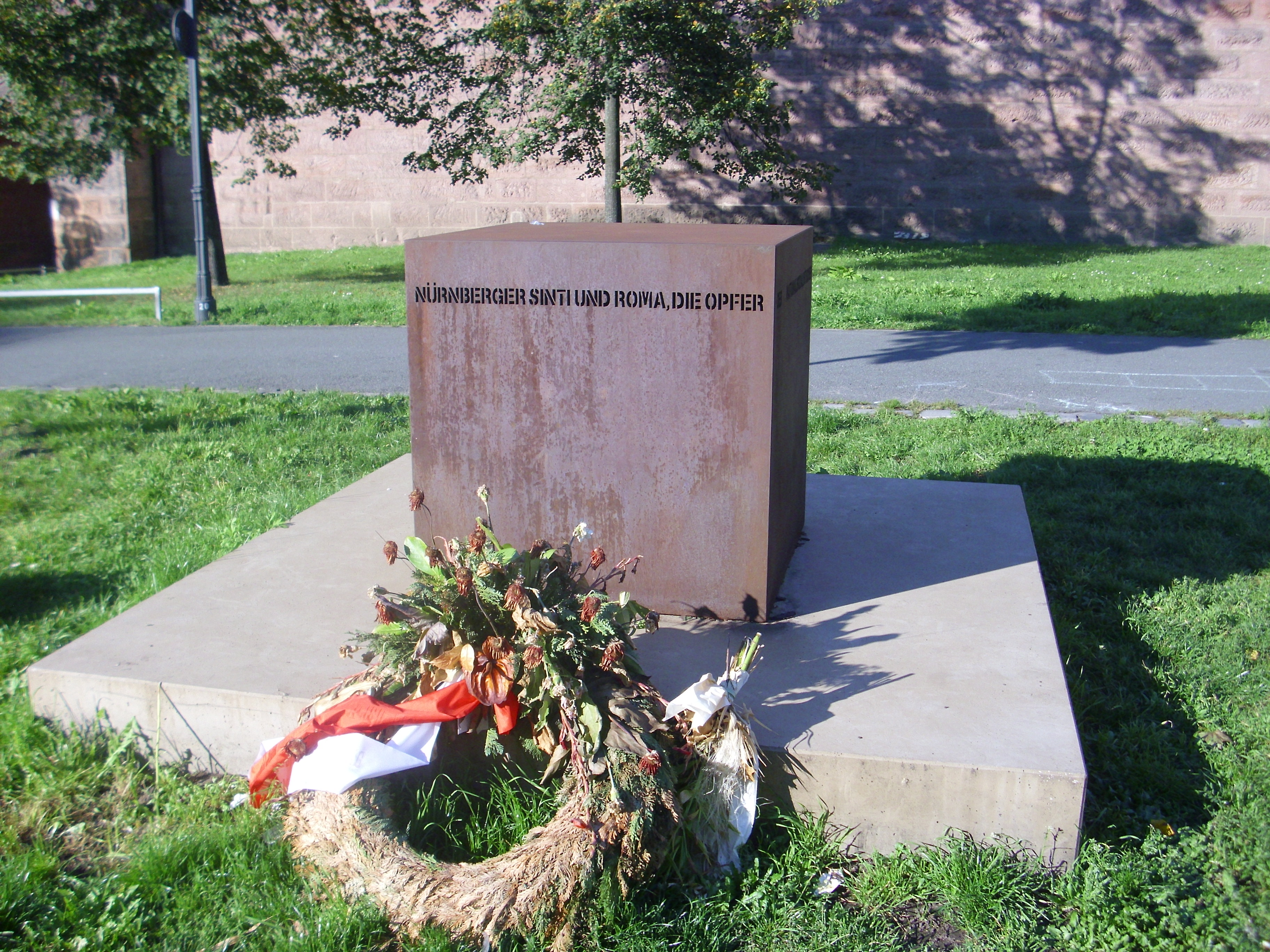 Mahnmal für die während der Zeit des Nationalsozialismus verfolgten Nürnberger Sinti und Roma östlich der Einmündung Färbertor/Frauentorgraben und gegenüber der Adresse Frauentorgraben 49, wo sich einst der Saalbau des Industrie- und Kulturvereins Nürnberg befand, wo im September 1935 die sogenannten Rassegesetze verabschiedet wurden (heute AOK Mittelfranken).